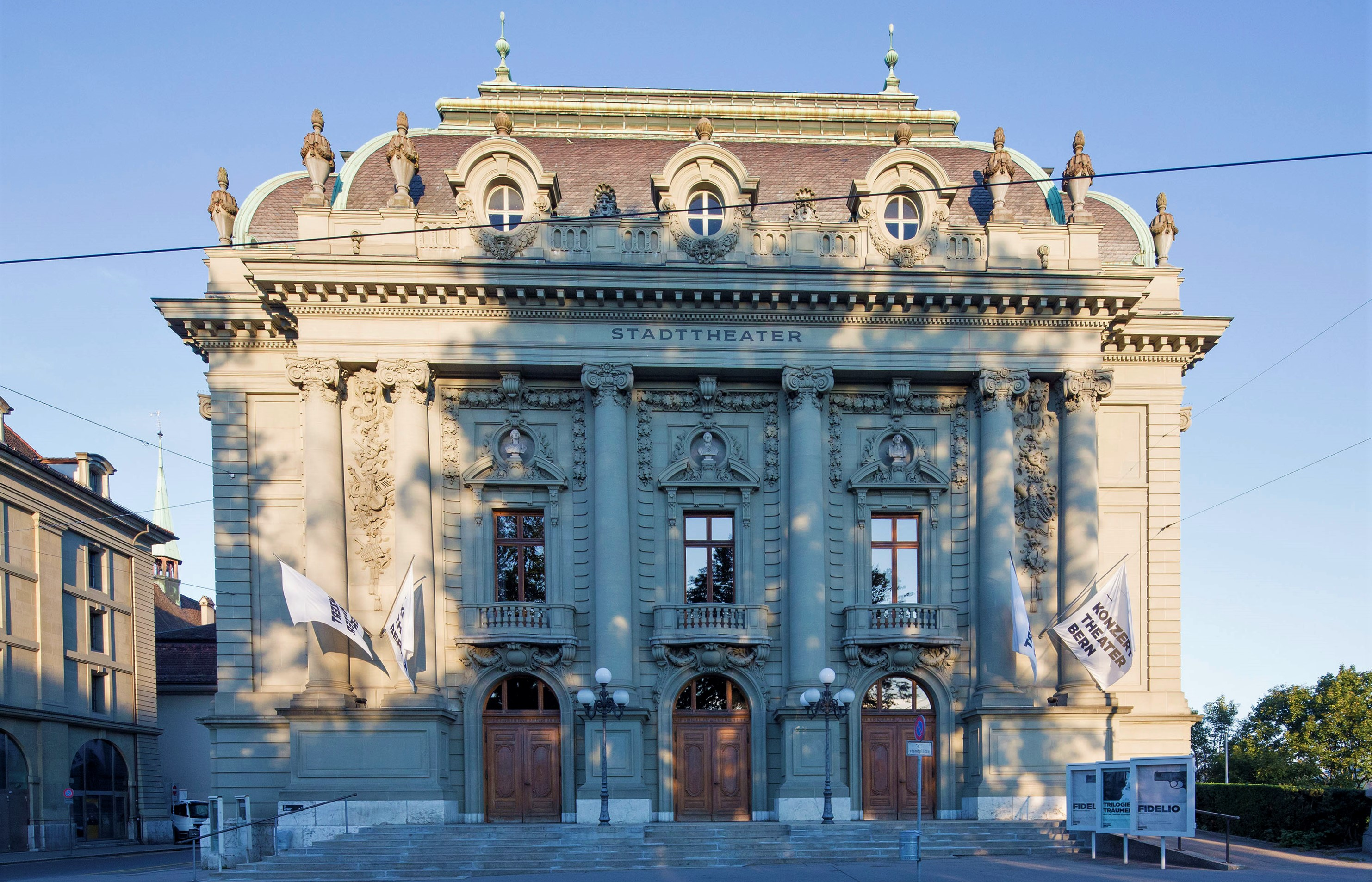 Konzert Theater Bern Aussenansicht @ Phillipp Zinniker